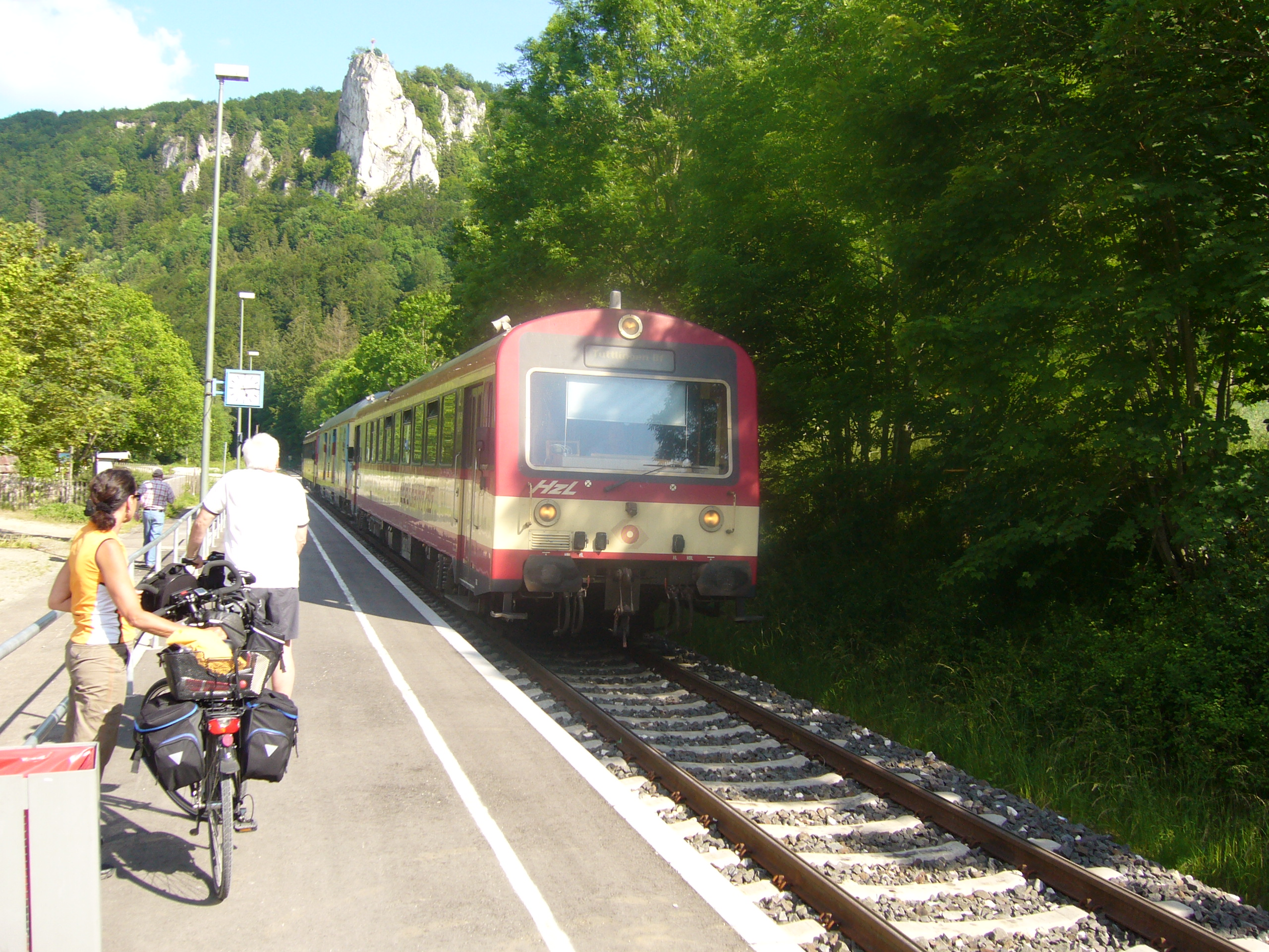 Radwanderzug (Naturpark-Express) im Bahnhof Beuron